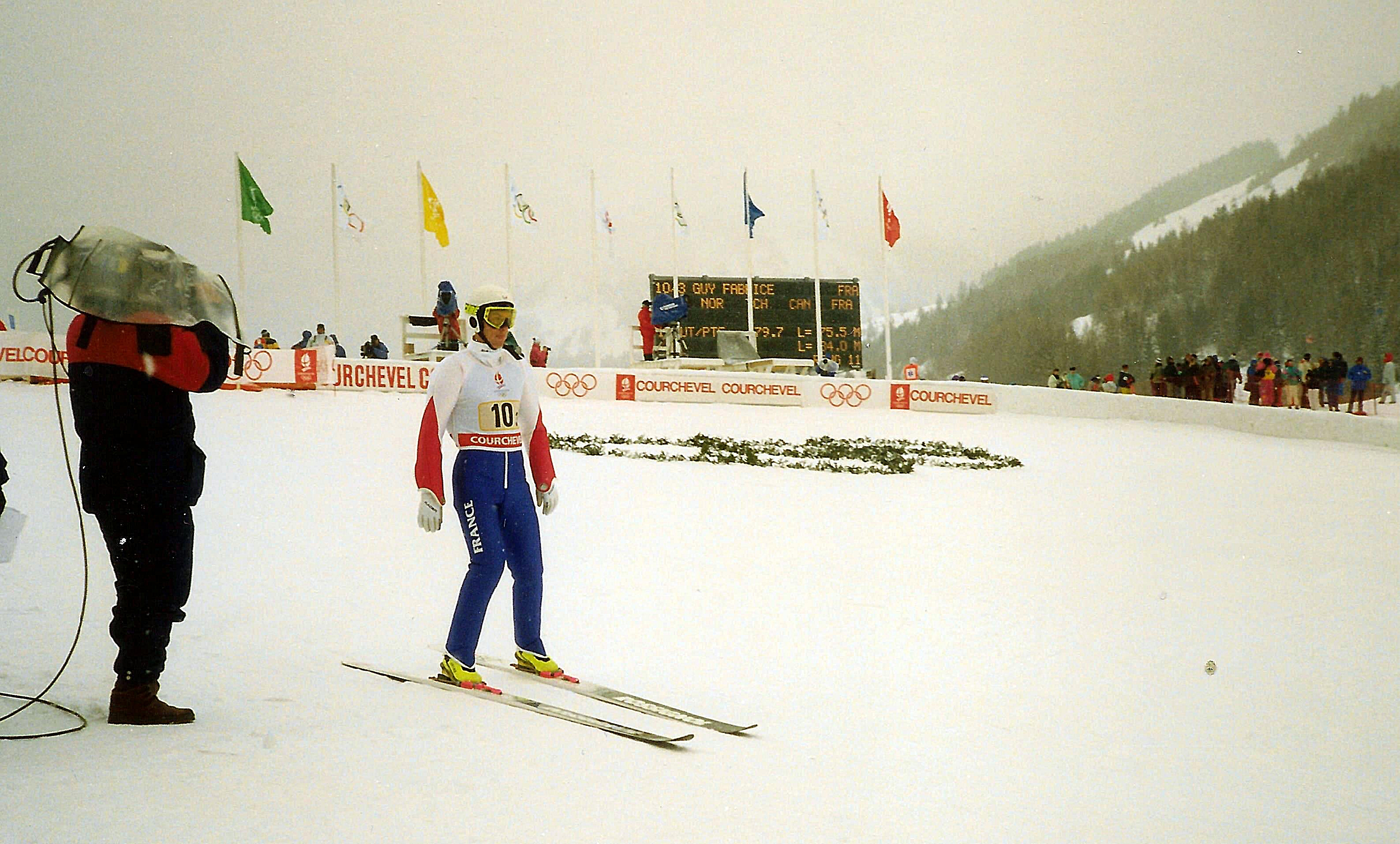 Fabrice Guy lors des J.O. d'Alberville, le 17 février 1992.